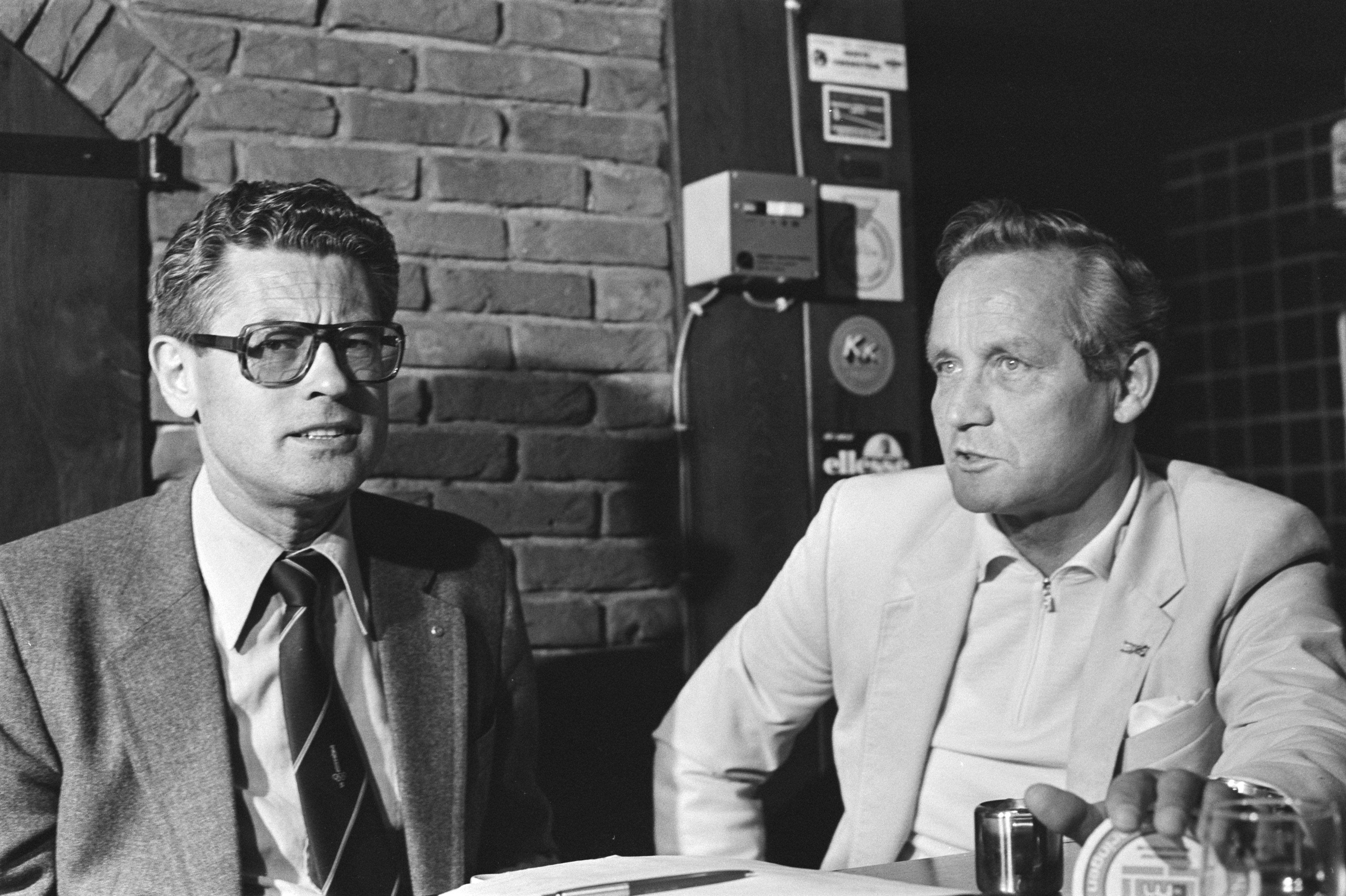 Collectie / Archief : Fotocollectie Anefo Reportage / Serie : [ onbekend ] Beschrijving : Persconferentie AZ67, 10a en 11a Roffel (directeur Olympisch Stadion) (l) met Klaas Molenaar (r) Datum : 18 mei 1981 Trefwoorden : persconferenties Fotograaf : Bogaerts, Rob / Anefo Auteursrechthebbende : Nationaal Archief Materiaalsoort : Negatief (zwart/wit) Nummer archiefinventaris : bekijk toegang 2.24.01.05 Bestanddeelnummer : 931-4919